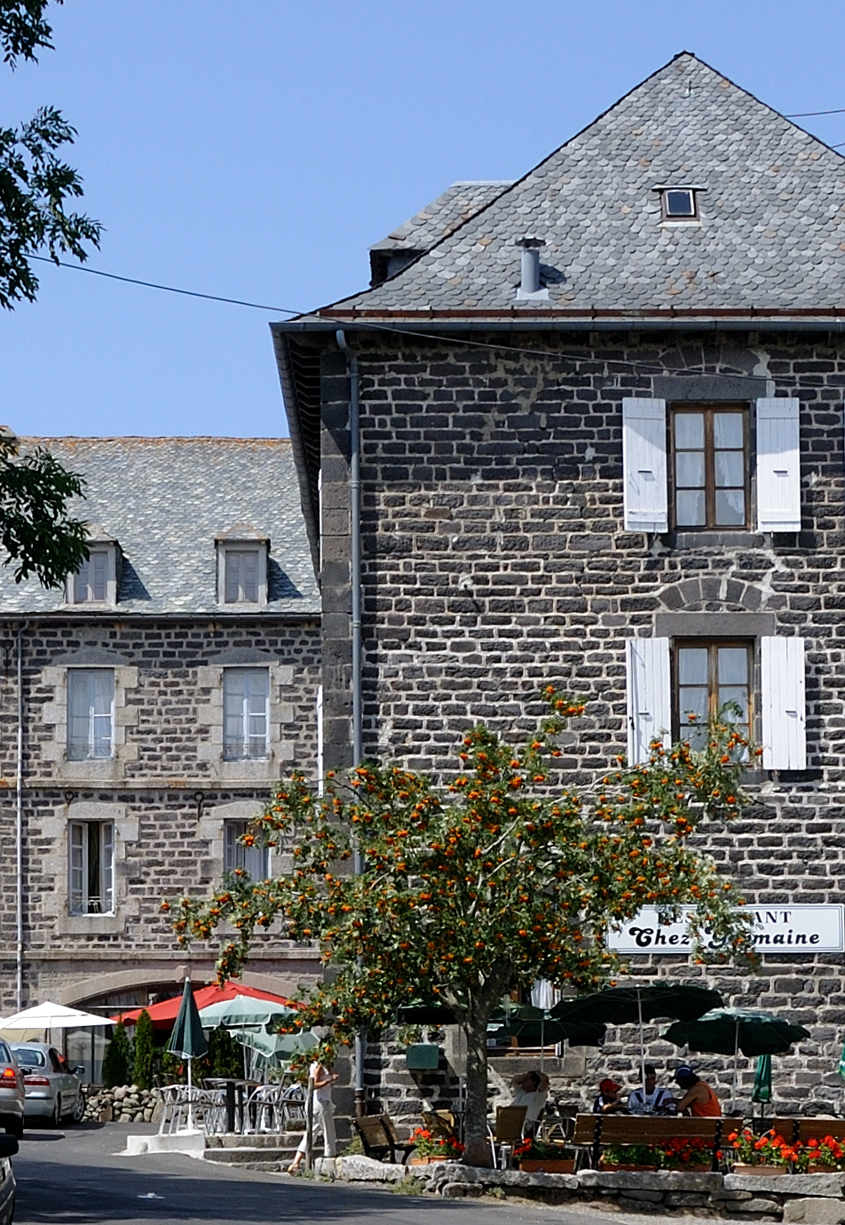 Saint-Chély-d'Aubrac (Aveyron, France) - Le restaurant "Chez Germaine" à Aubrac.